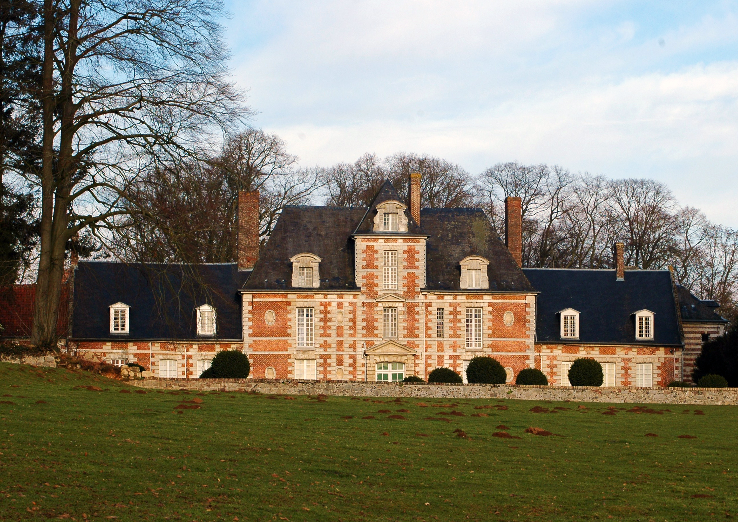 Vauchelles-lès-Domart (Somme, France). Le château, vu depuis la route venant de Mouflers.